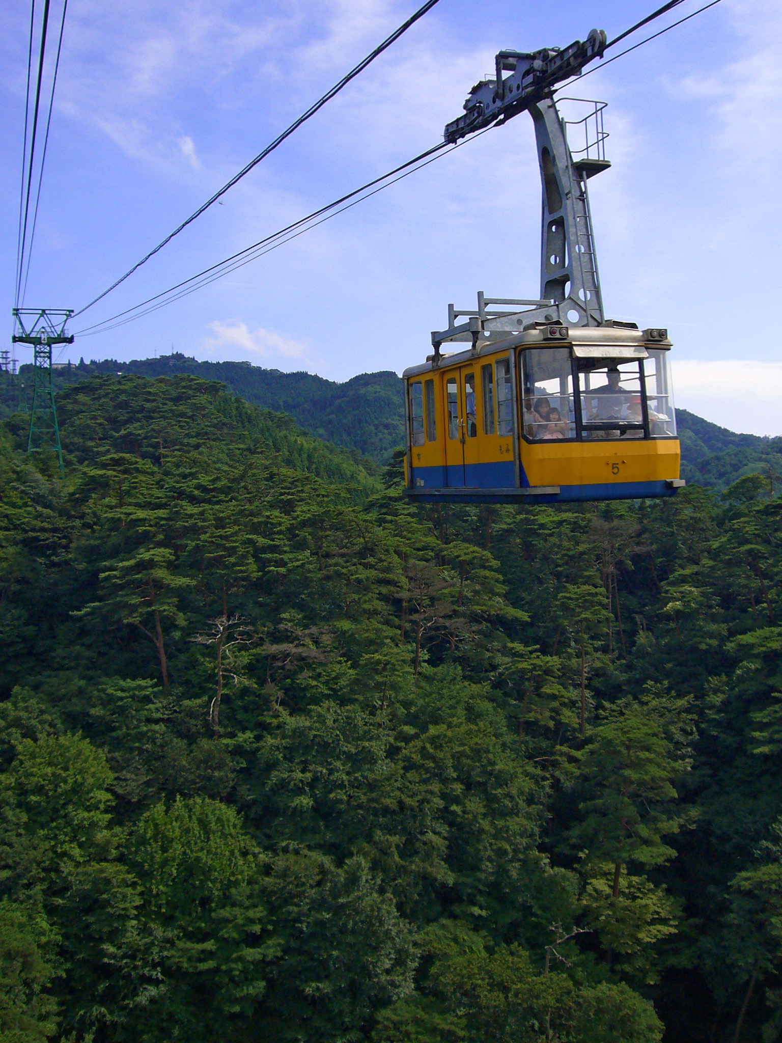 Rokko-Arima Ropeway in Kobe, Japan